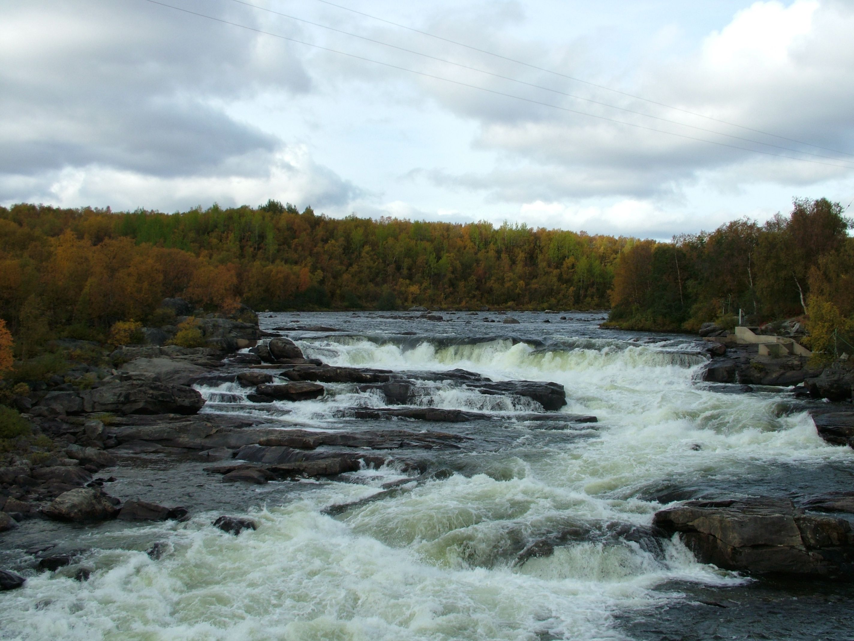 Der Wasserfall Skoltefossen im Ort Neiden in der Gemeinde Sør-Varanger in Nordnorwegen.